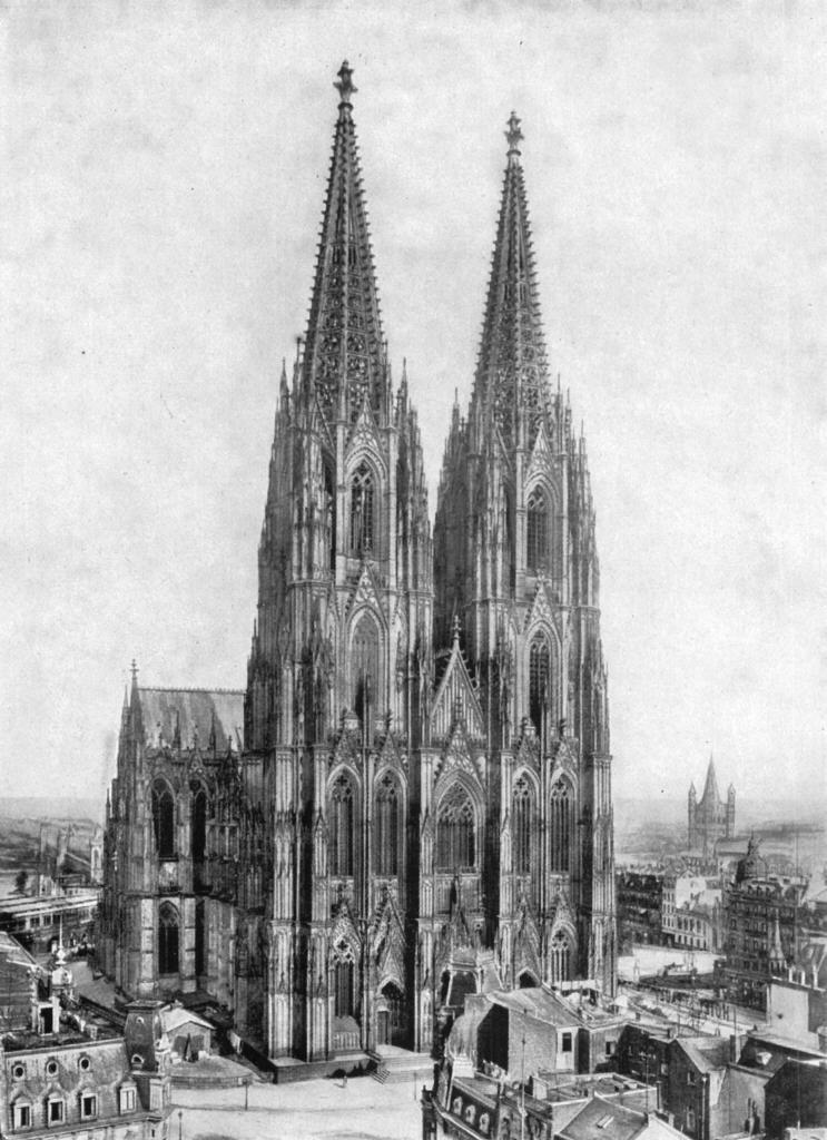 Kölner Dom um 1925